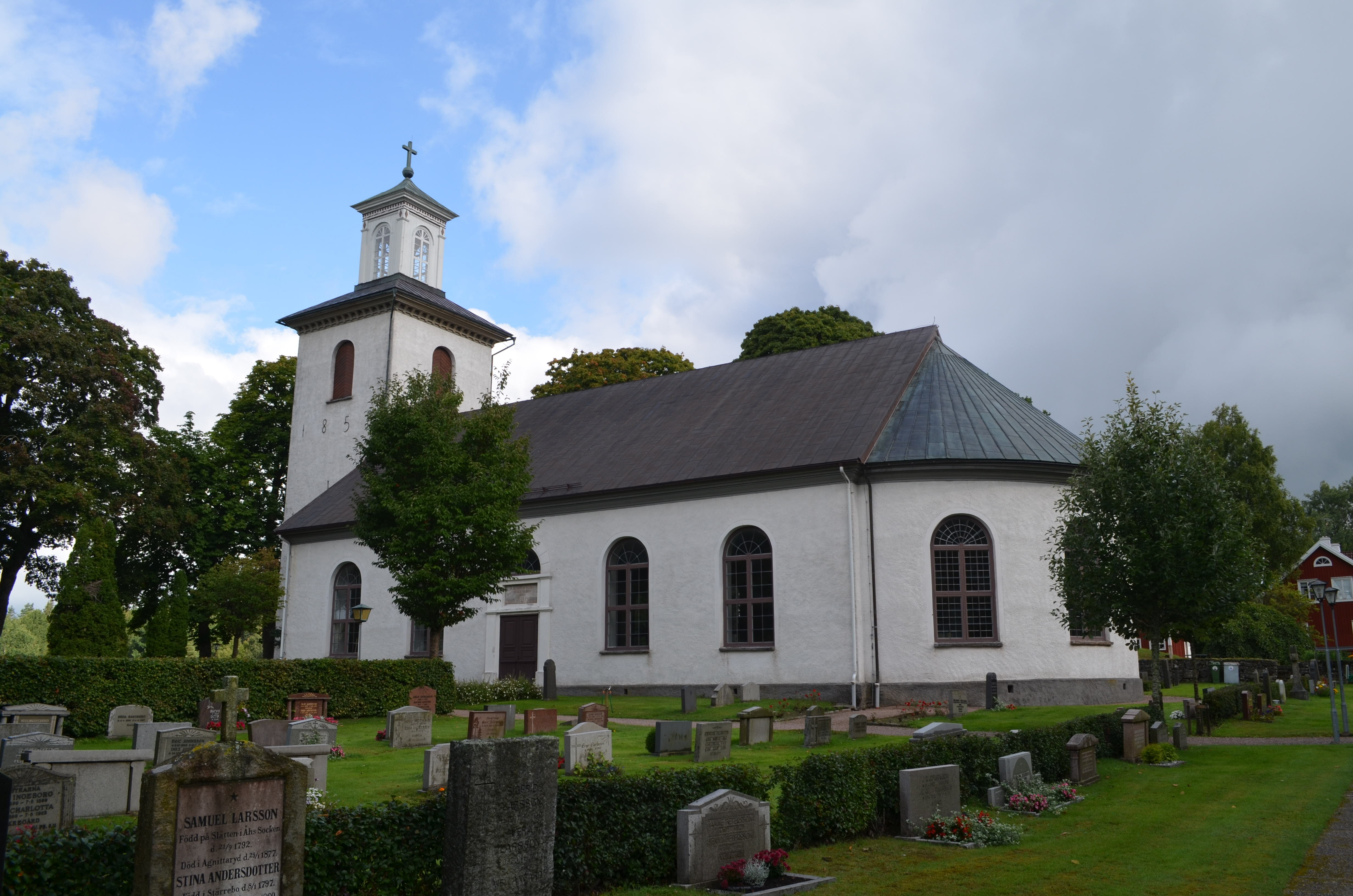 Kållerstad kyrka